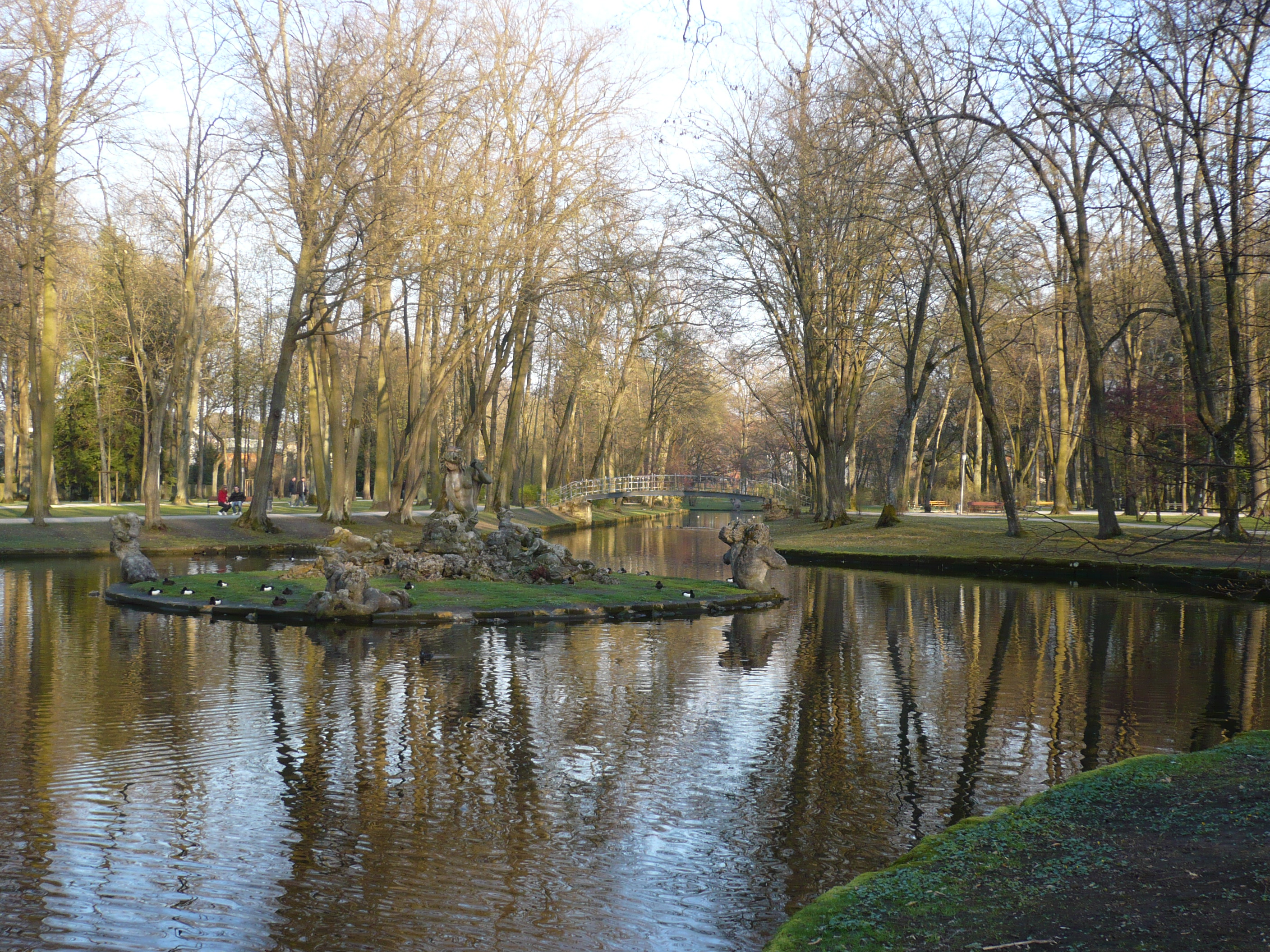 Bayreuth Tappert im Hofgarten